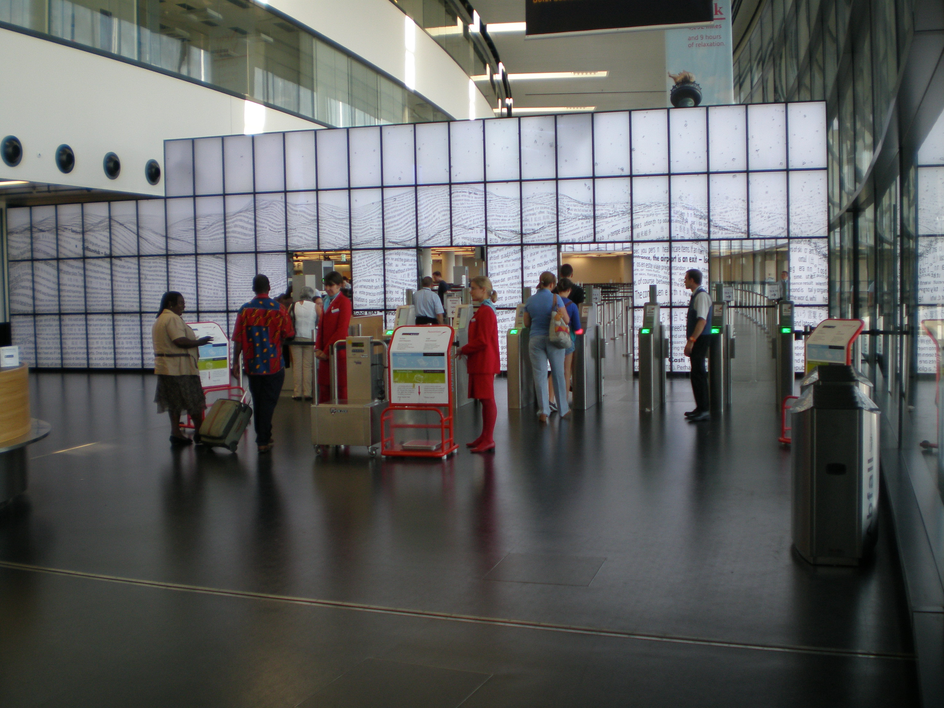 Die Bordkartenkontrolle 3 am Flughafen Wien. Sie befindet sich im Check-in Bereich 3. Den Durchgang bildet eine Bildschirmwand. Sie wird mit Medienkunst der Ars Electronica bespielt. Durchschreitende Passagiere lösen einen Buchstabenregen aus, welcher eine virtuelle Landschaft bildet.